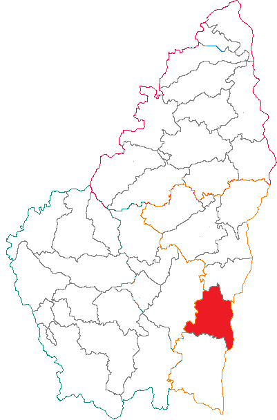 Situation du canton dans le département de l'Ardèche (France)